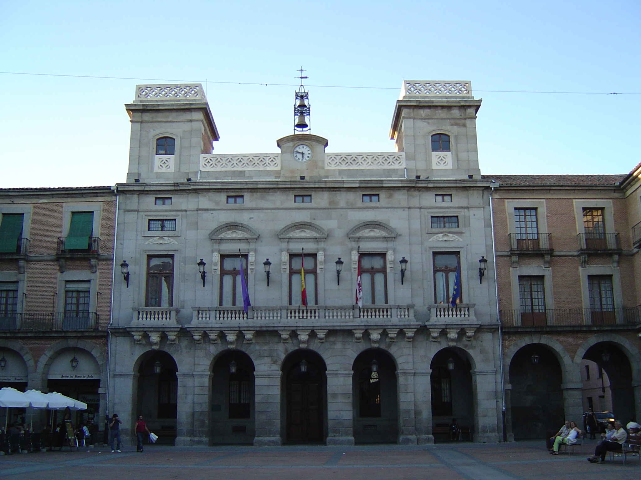 Ayuntamiento